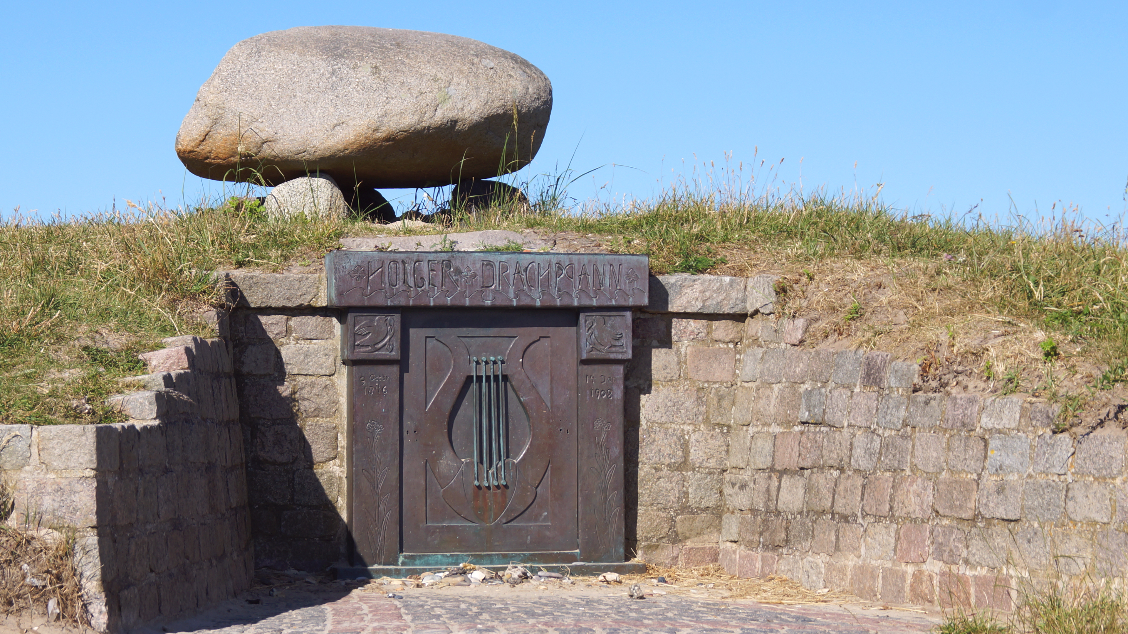 Grabstätte Holger Drachmann nördl Skagen Grenen in Dünen Dichter & Maler Grufttor Maler Peder Severin Krøyer - Foto 2018 Wolfgang Pehlemann DSC01668